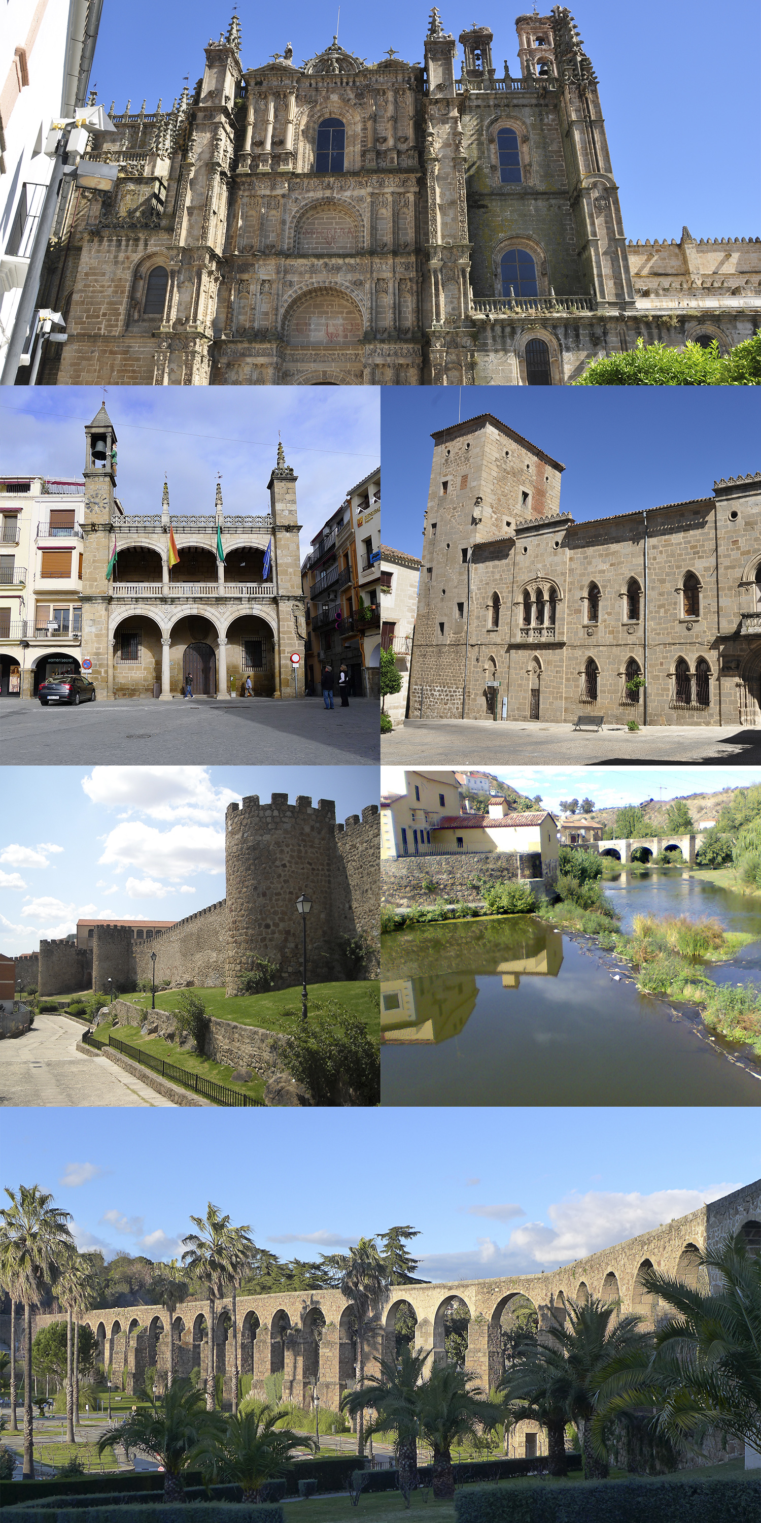 Collage de Plasencia